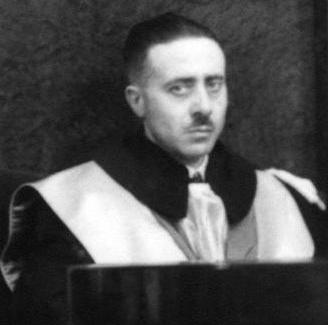 rettore, giurista, accademico e partigiano italiano